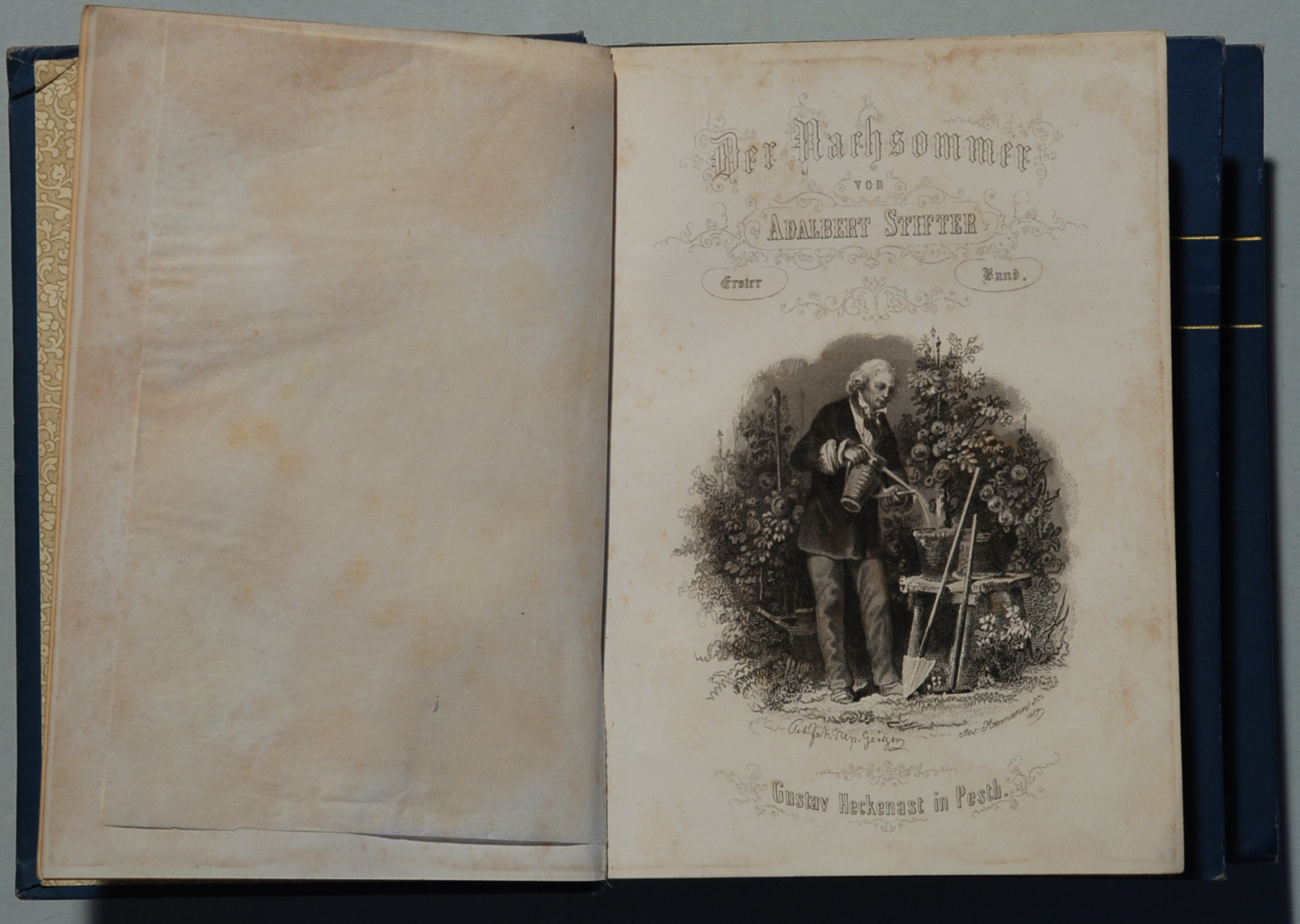 Erstdruck. Titelblatt in Stahl gestochen von Josef Axmann (1793-1873) nach der Vorlage von Peter Johann Nepomuk Geiger (1805-1880)